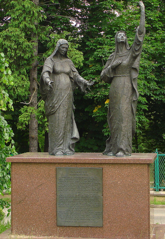 Częstochowa, zespół klasztorny paulinów na Jasnej Górze